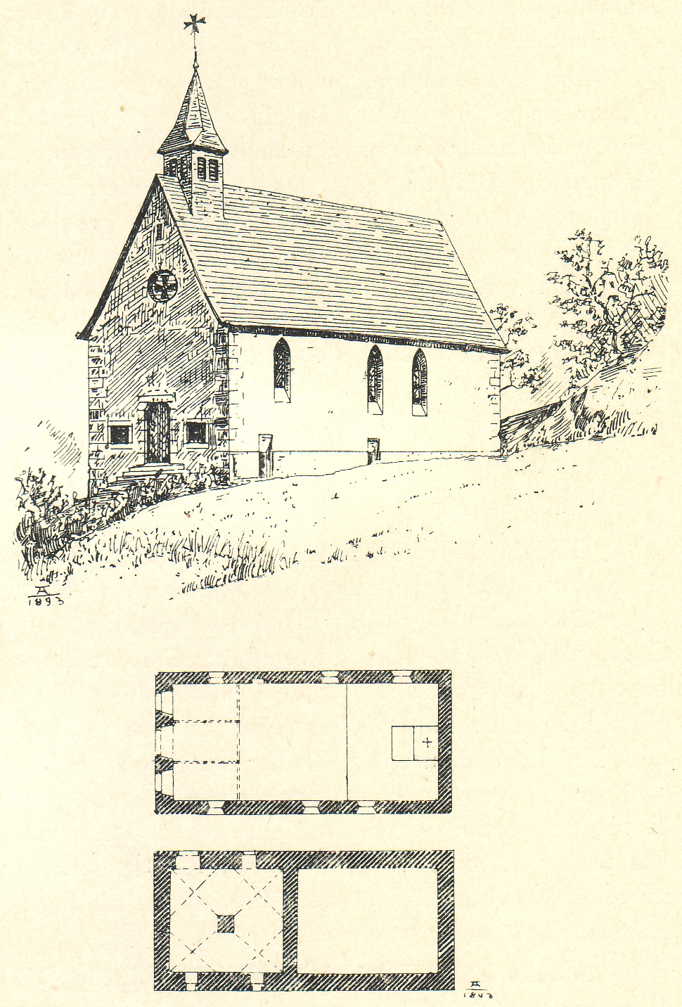 Sankt Johann Baptist (Bergisch Gladbach-Herrenstrunden)